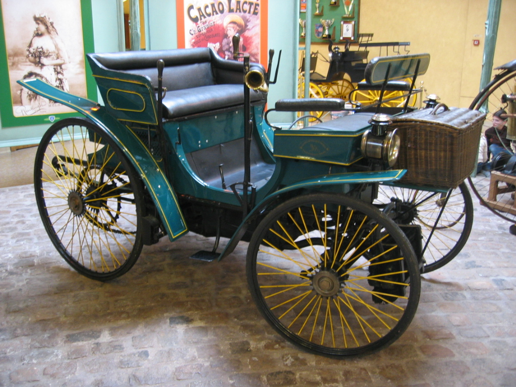 Peugeot Type 3 Vis à vis (face to face), 1891.- Musée Peugeot de Sochaux